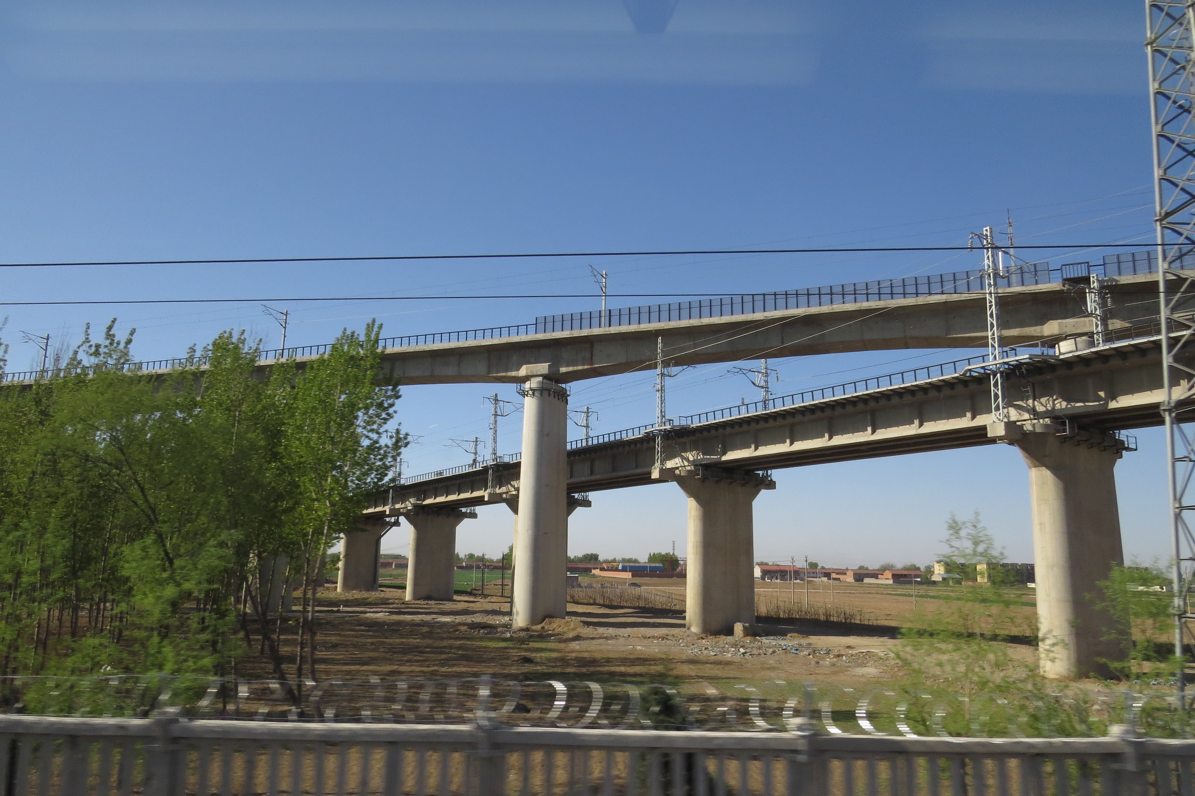 张唐铁路及其唐北联络线（唐山北站西侧）